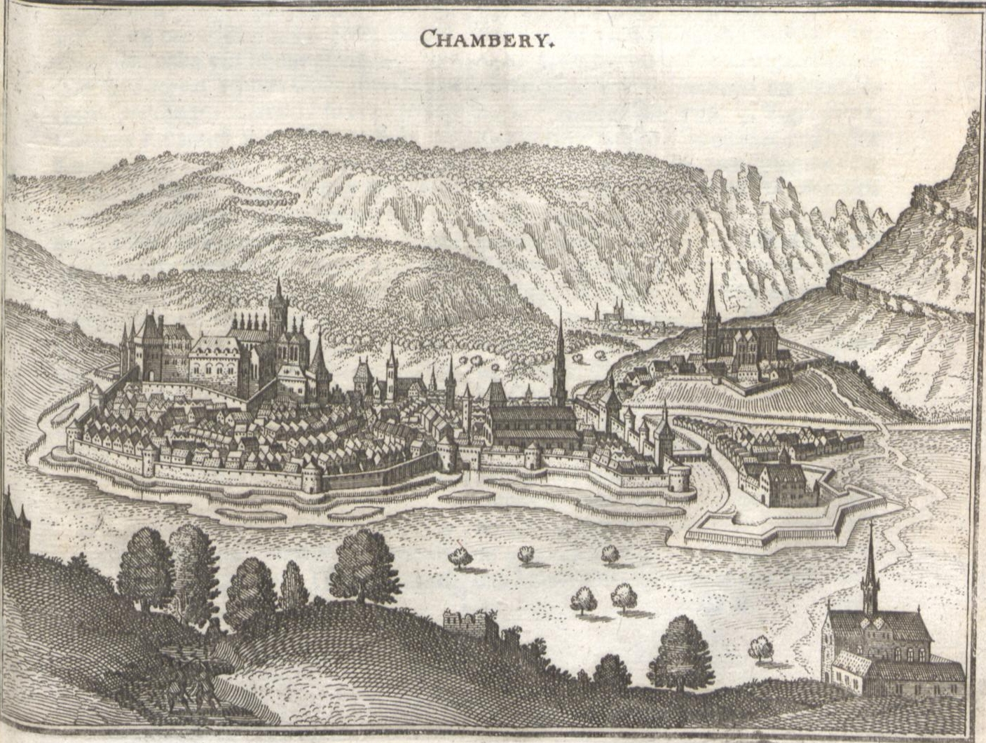 Topographia Palatinatus Rheni et Vicinarum Regionum Das ist, Beschreibung vnd Eigentliche Abbildung der Vornemsten Statte, Plätz der Vntern Pfaltz am Rhein Vnd Benachbarten Landschafften, als der Bistümer Wormbs Vnd SpeÈyer, der Bergstraß, des Wessterreichs, Hundsrücks, ZweÈybrüggen, etc